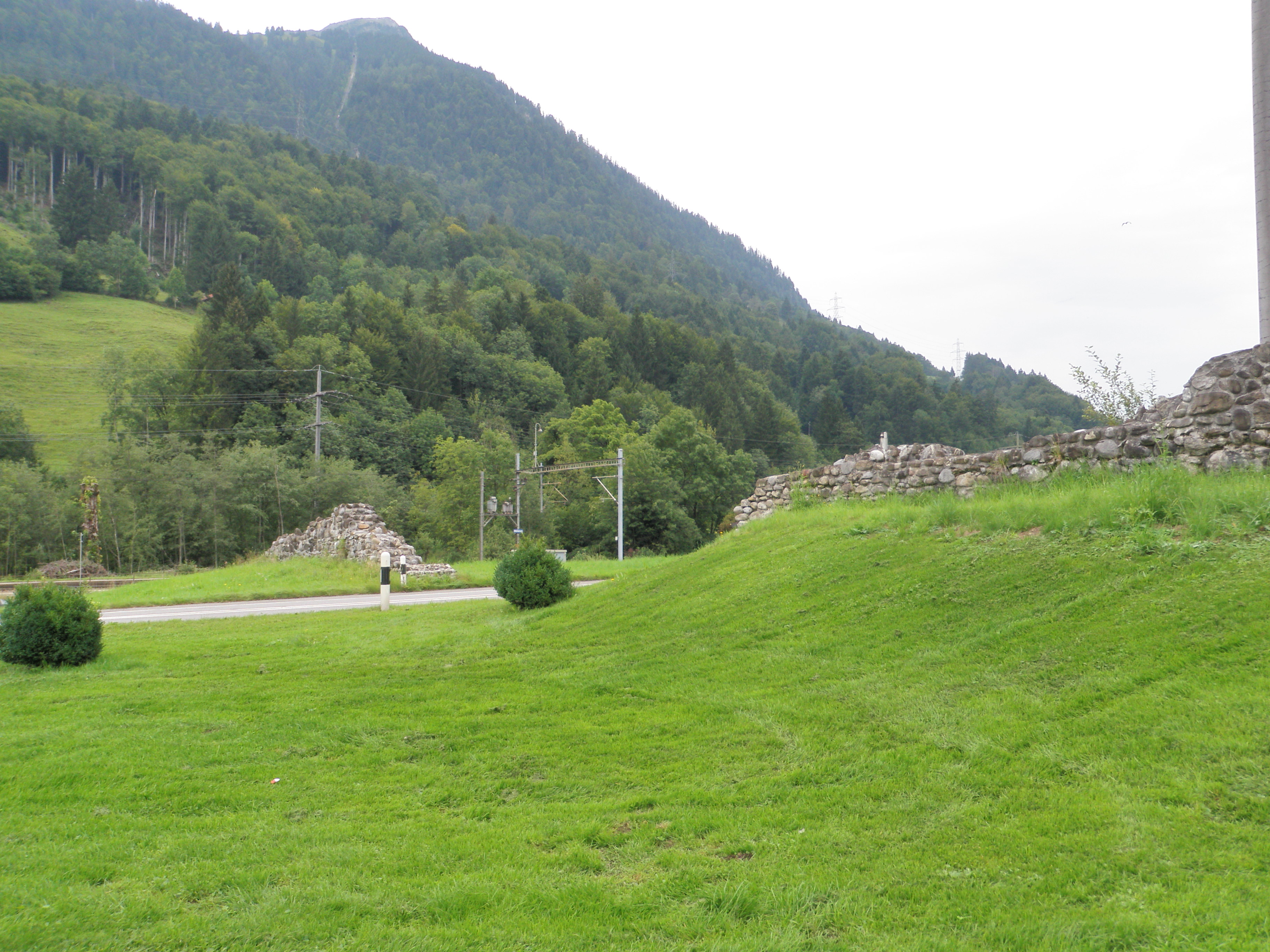 Letzimauer bei Mülenen im Kandertal